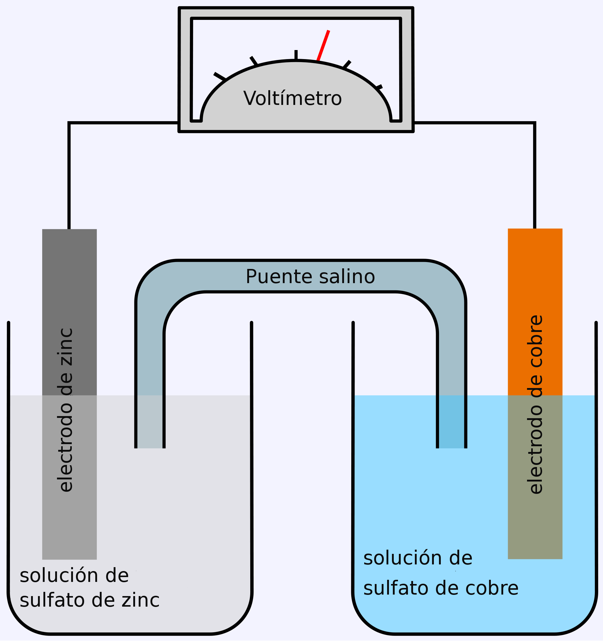 original en Image:Galvanische_Zelle.png, Traducción de palabras al español. Editada con Gimp bajo Ubuntu.